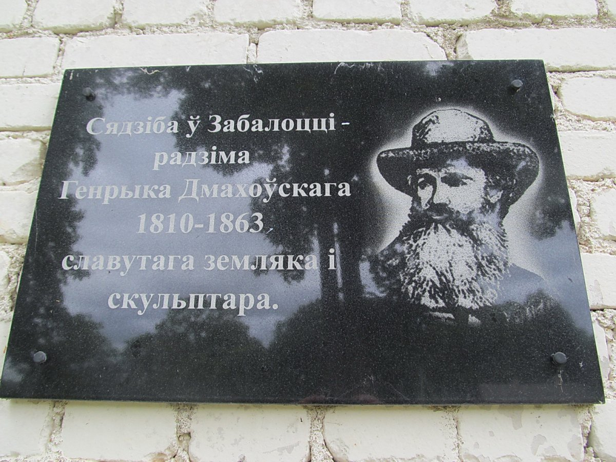 Забалоцце (Перабродскі сельсавет). Сядзіба Дмахоўскіх